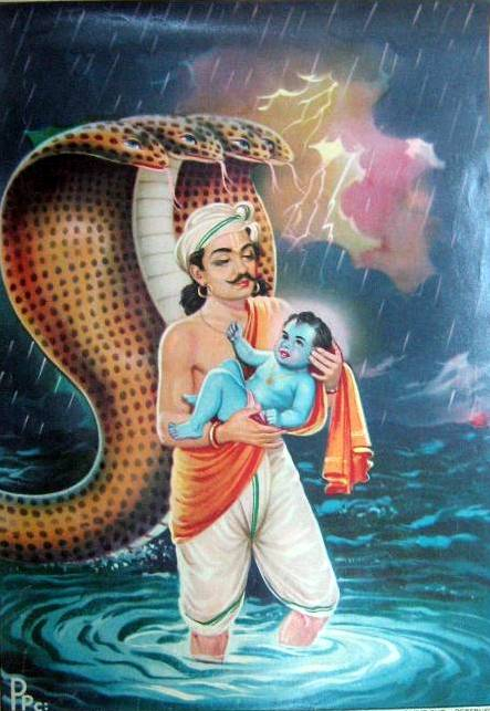 Bazaar art,1940's